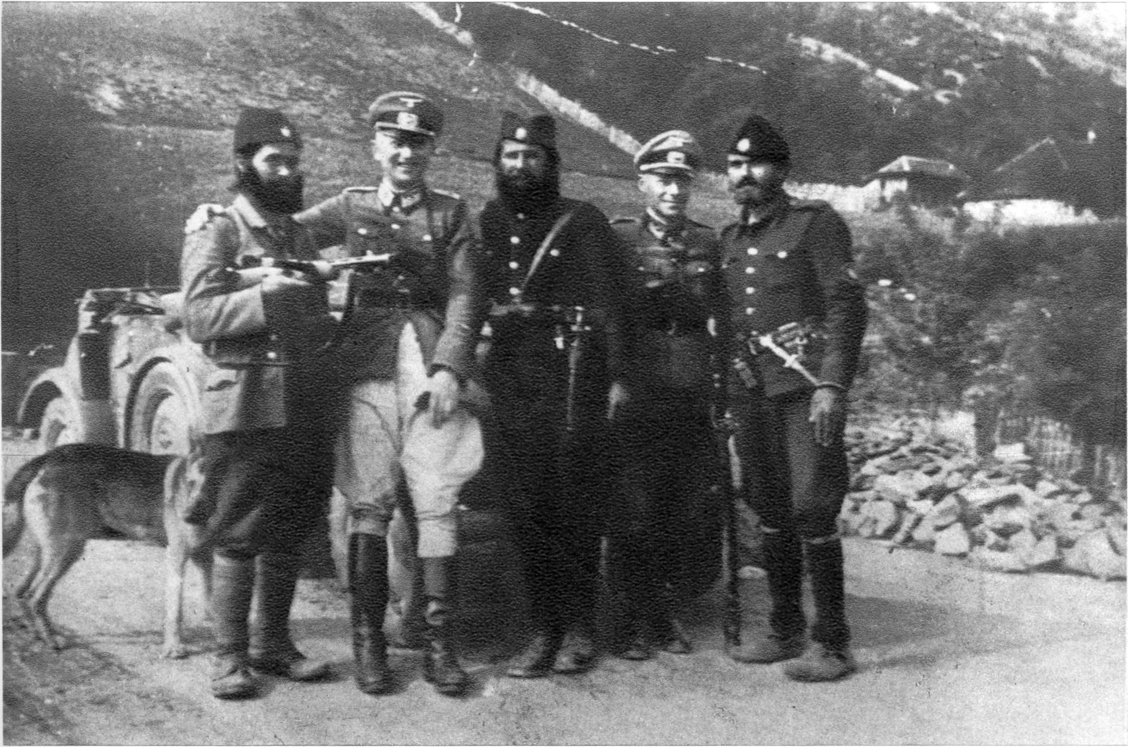 Srpskohrvatski / српскохрватски: Četnici i Nemci u okupiranoj Jugoslaviji.